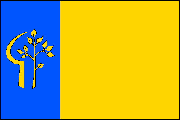 Bohutice, vlajka. Žlutý list s žerďovým modrým pruhem širokým jednu třetinu délky listu. V modrém pruhu srp přivrácený ke vztyčené listnaté větvi, oboje žluté. Poměr šířky k délce listu je 2:3.